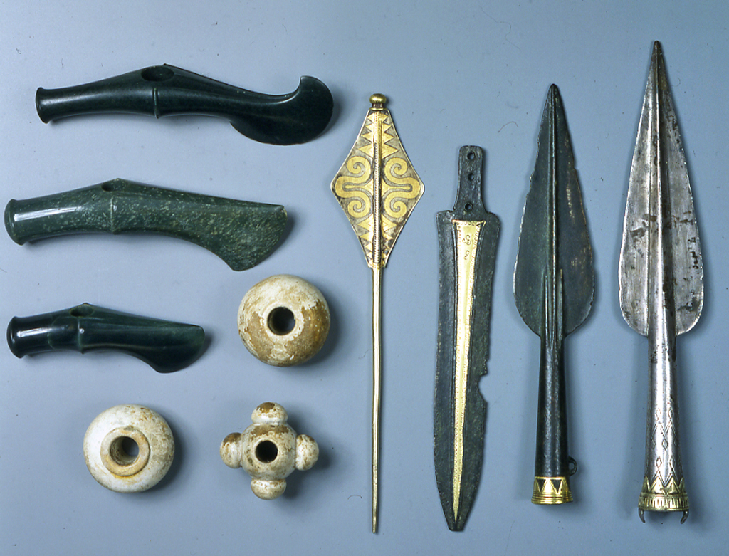 Фото Бородинского клада. 1914 год